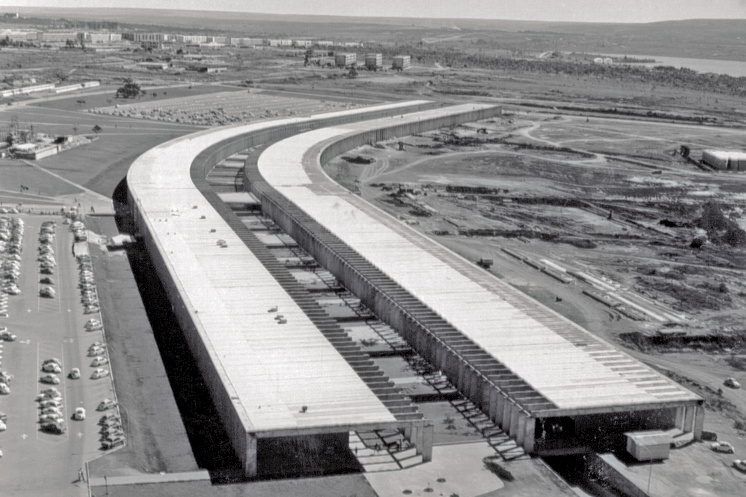 Brasília, DF, Brasil 10/05/2017. ICC é palco de exposição fotográfica em homenagem ao aniversário da UnB. Mostra composta por 92 fotos conta a história da Universidade e pode ser conferida na ala central do Minhocão. Confira a matéria completa no portal da Universidade de Brasília